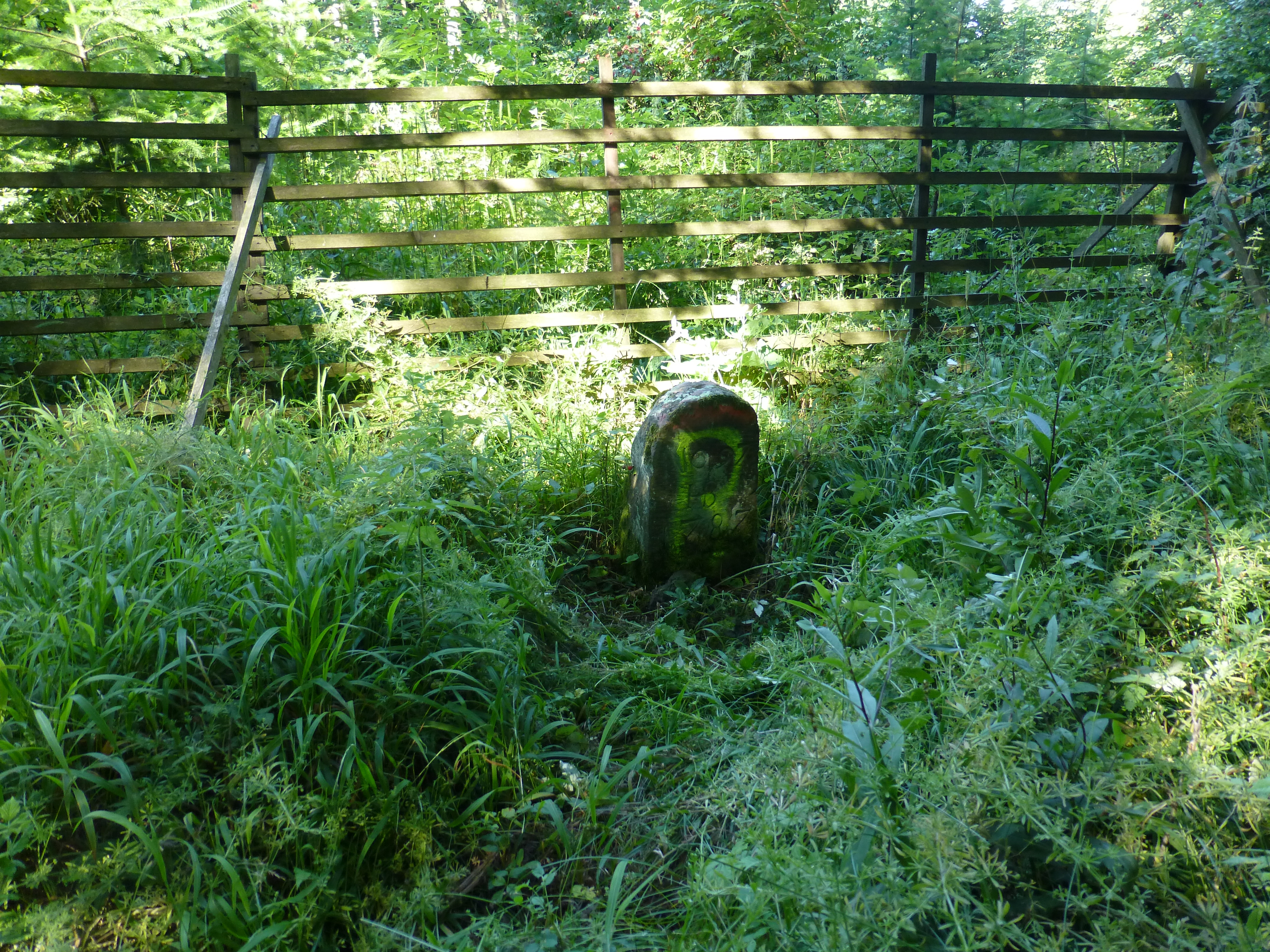 Hutestein im Gipfelbereich des Schwengebergs